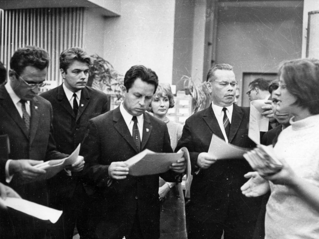 Первый секретарь ЦК ВЛКСМ Е.М.Тяжельников в ходе визита в Государственную республиканскую юношескую библиотеку (ныне РГБМ), начало 1970-х гг.